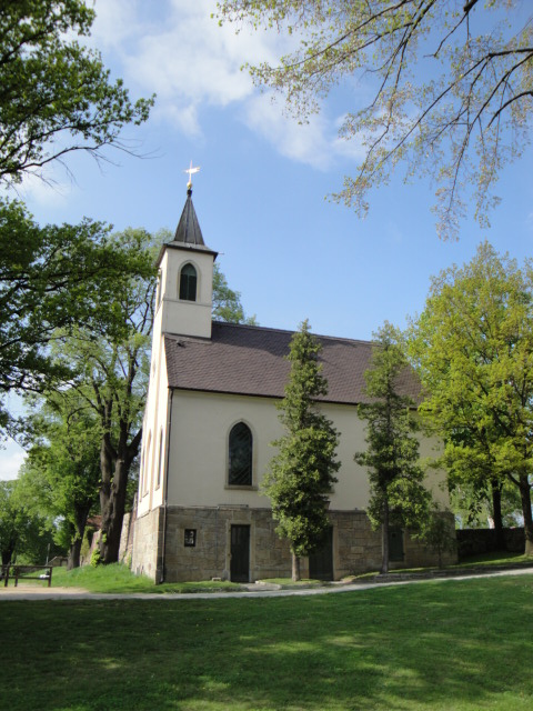 Die Kapelle auf dem Bautzener Protschenberg. Hornjoserbsce: Kapała na Budyskim Hrodźišku.